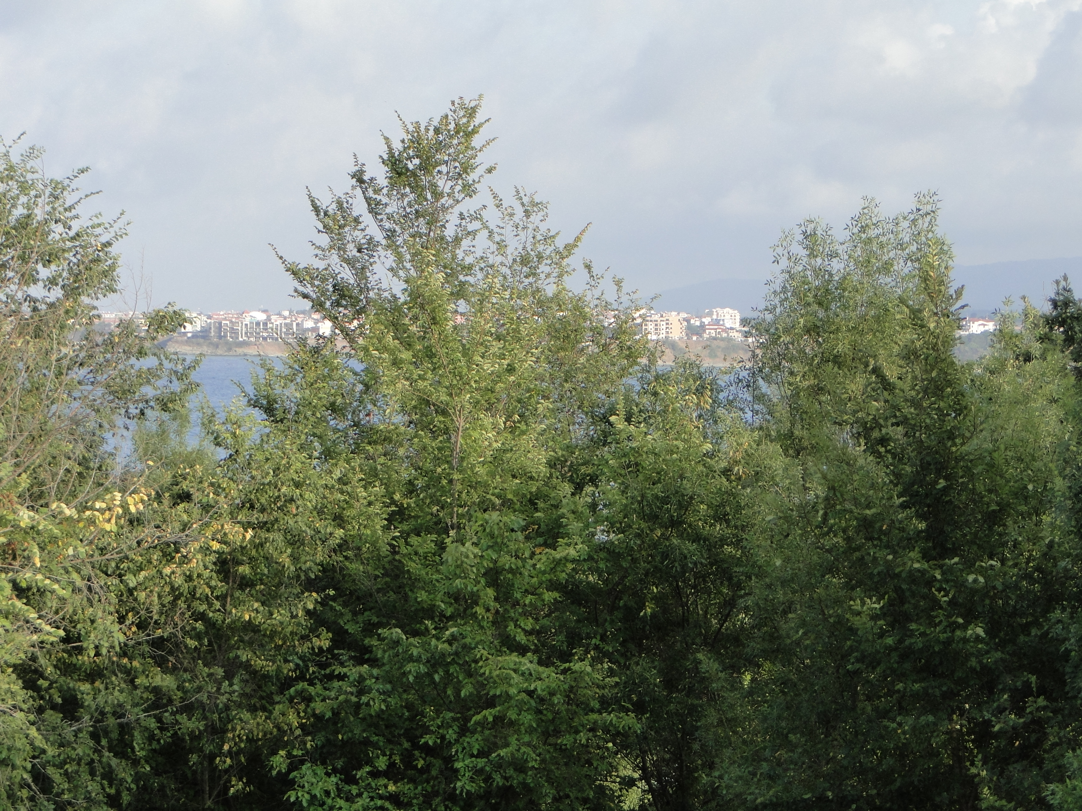 Китен Bulgaria